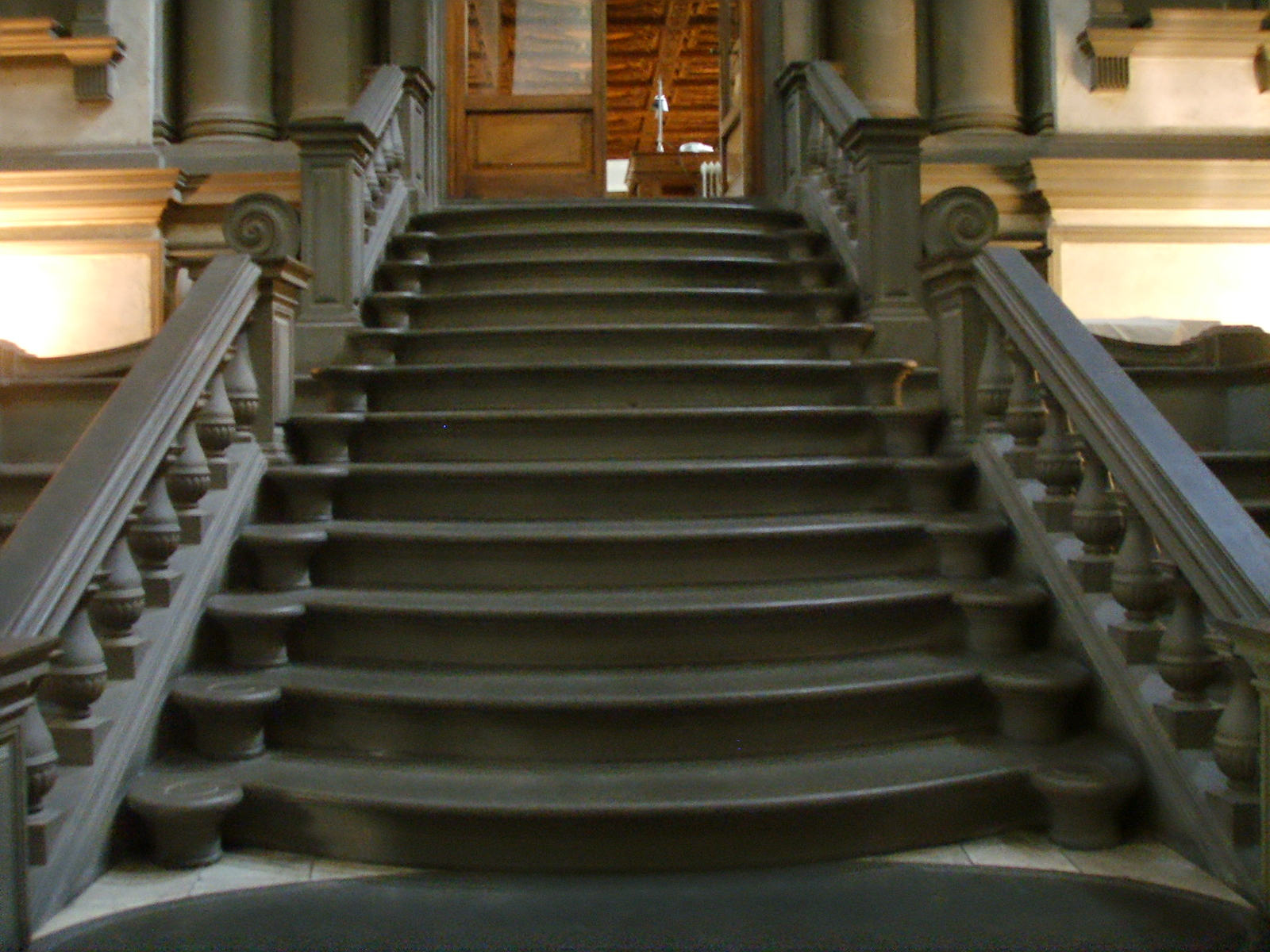 Biblioteca medicea laurenziana scalone di michelangelo